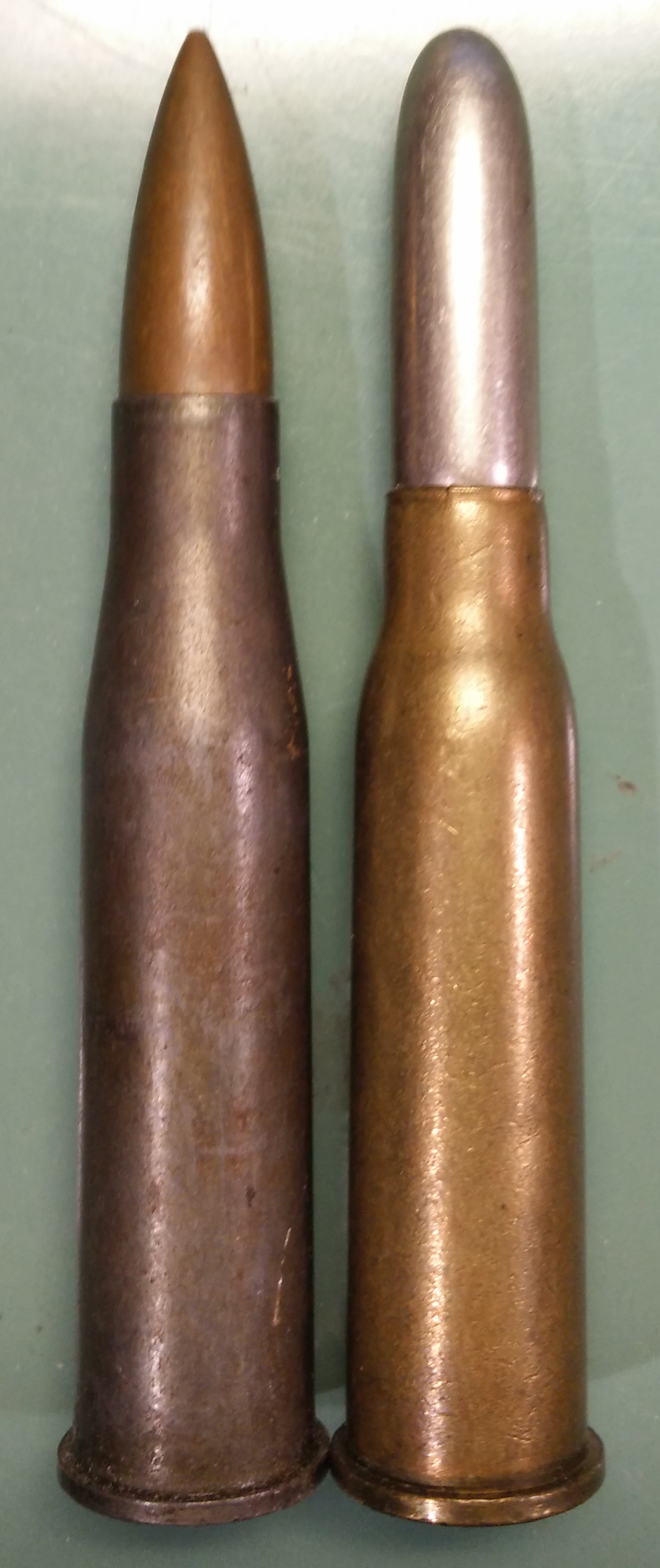 Primerjava nabojev 8x50R in 8x56R.